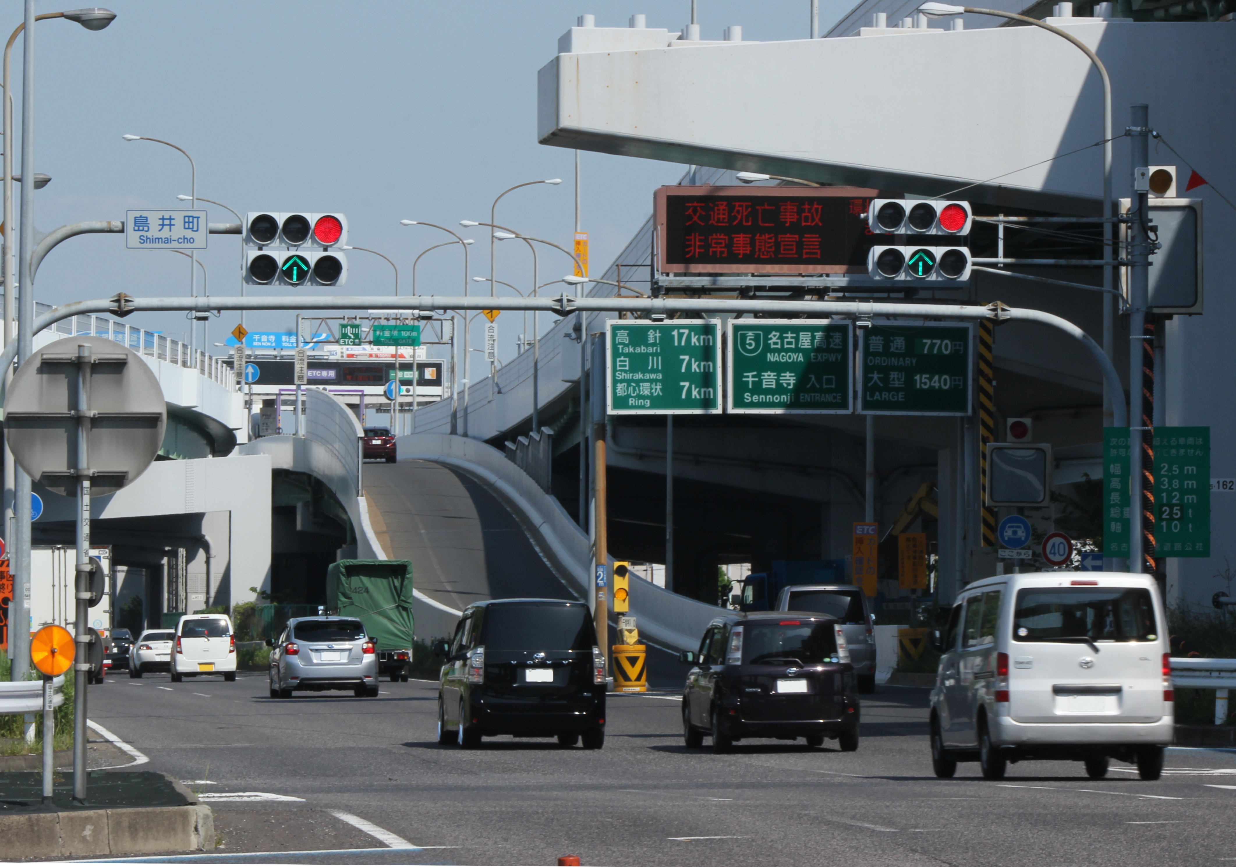 名古屋高速千音寺入口